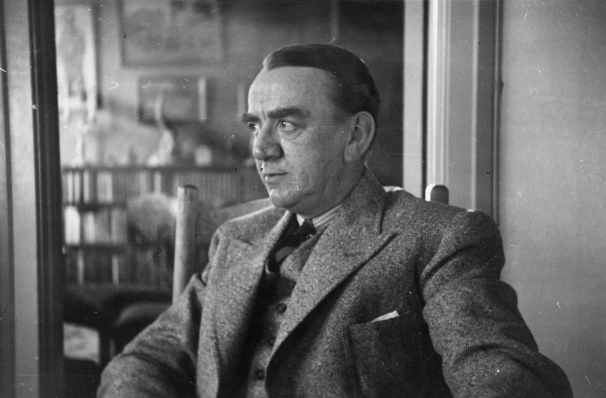 Øyvind Sørensen var en norsk tegner. Han regnes av flere som Norges første avistegner.